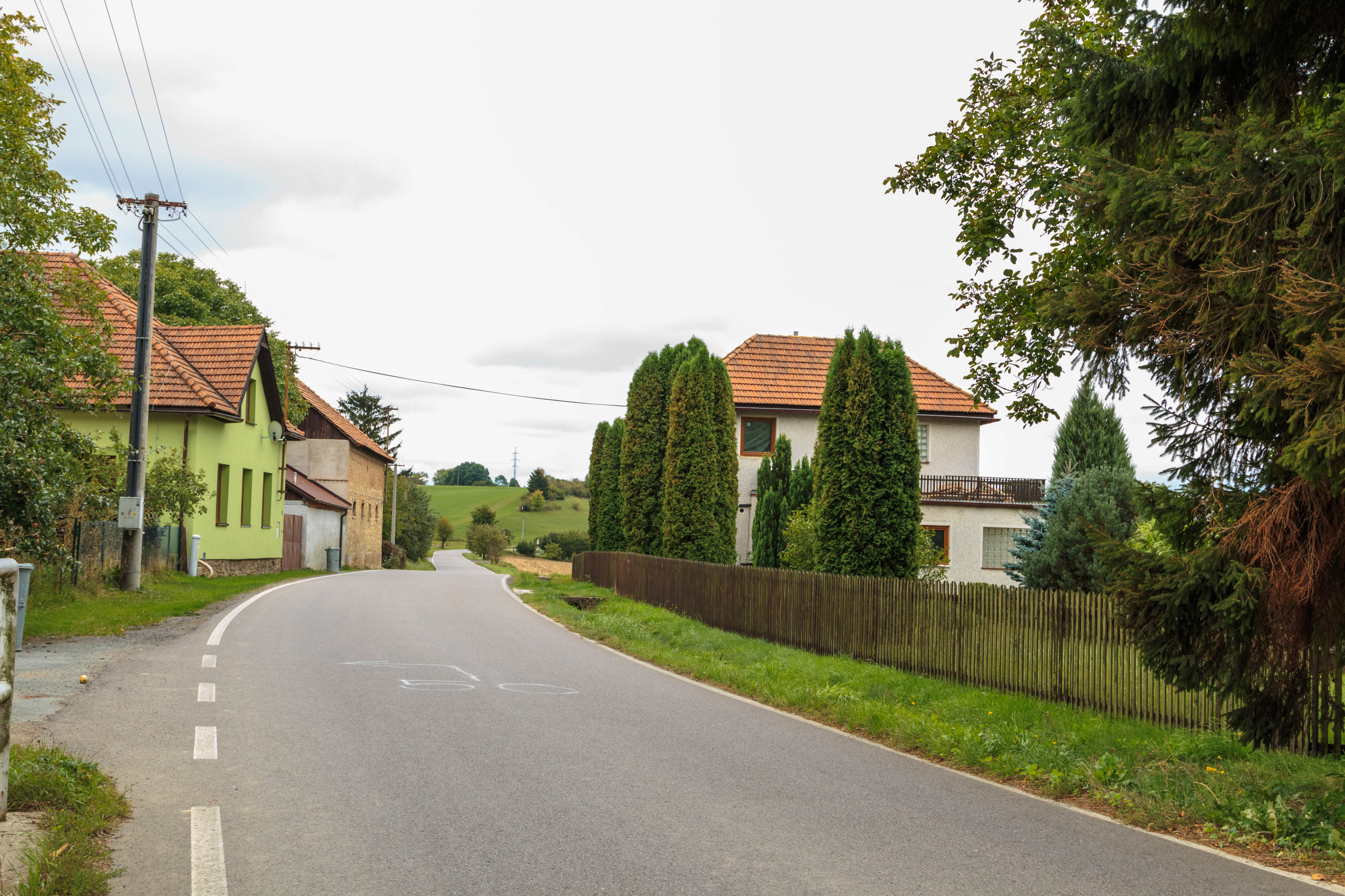 Rostejn čp. 3